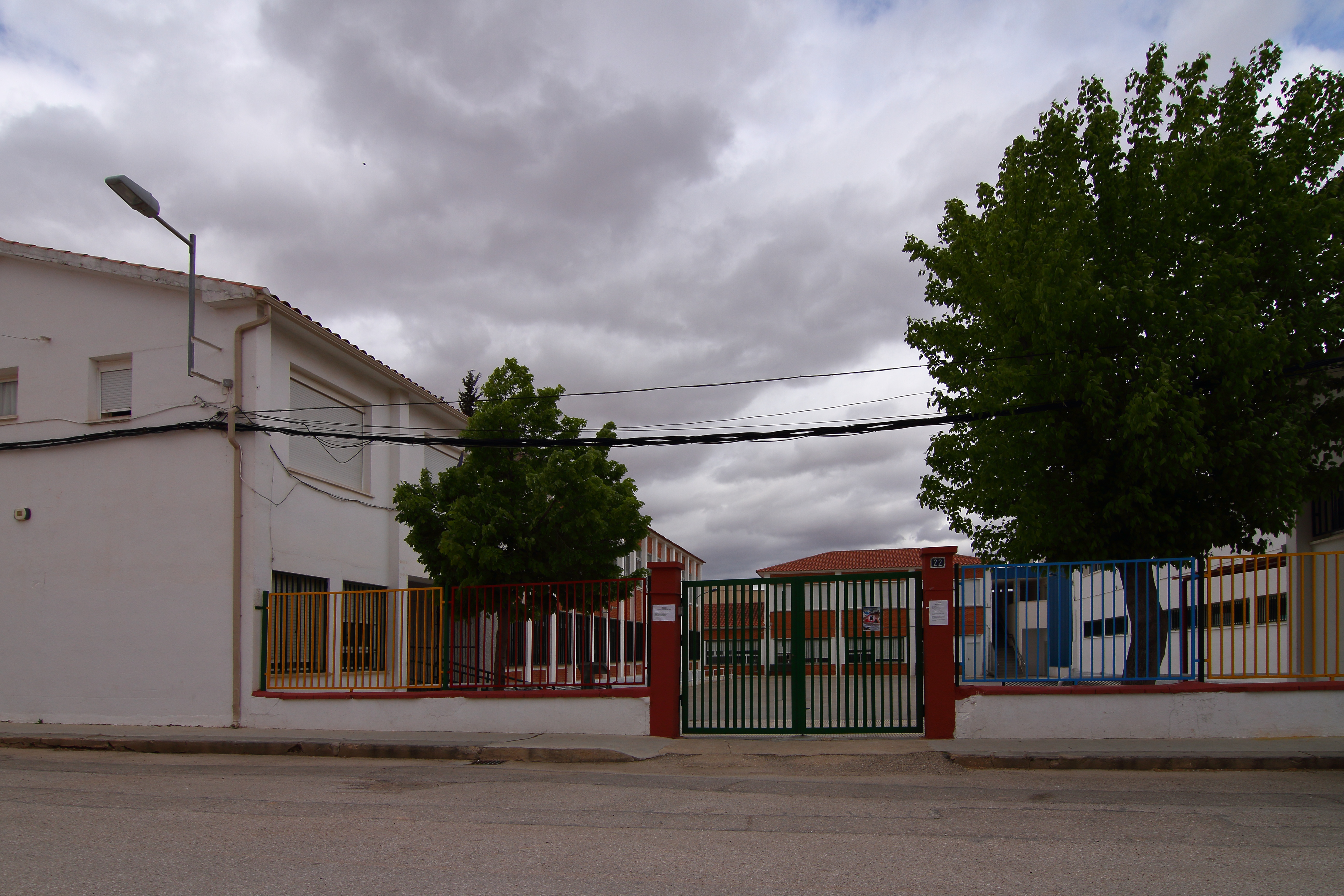 Ledaña, colegio público